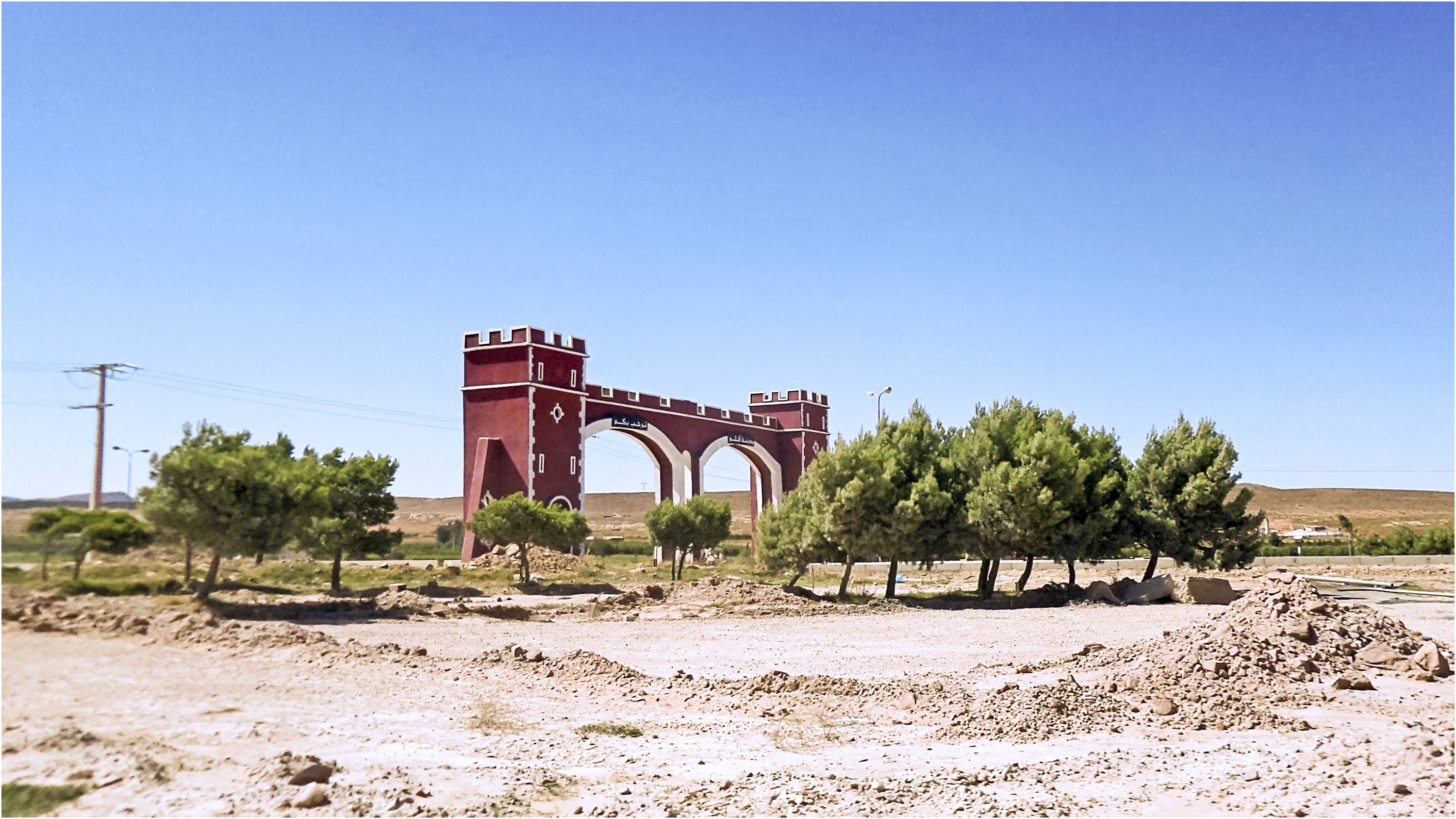 Aflou افلو